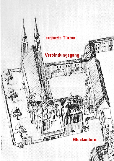 Ansicht der Berliner Domkirche südlich des Berliner Stadtschlosses, 1685.